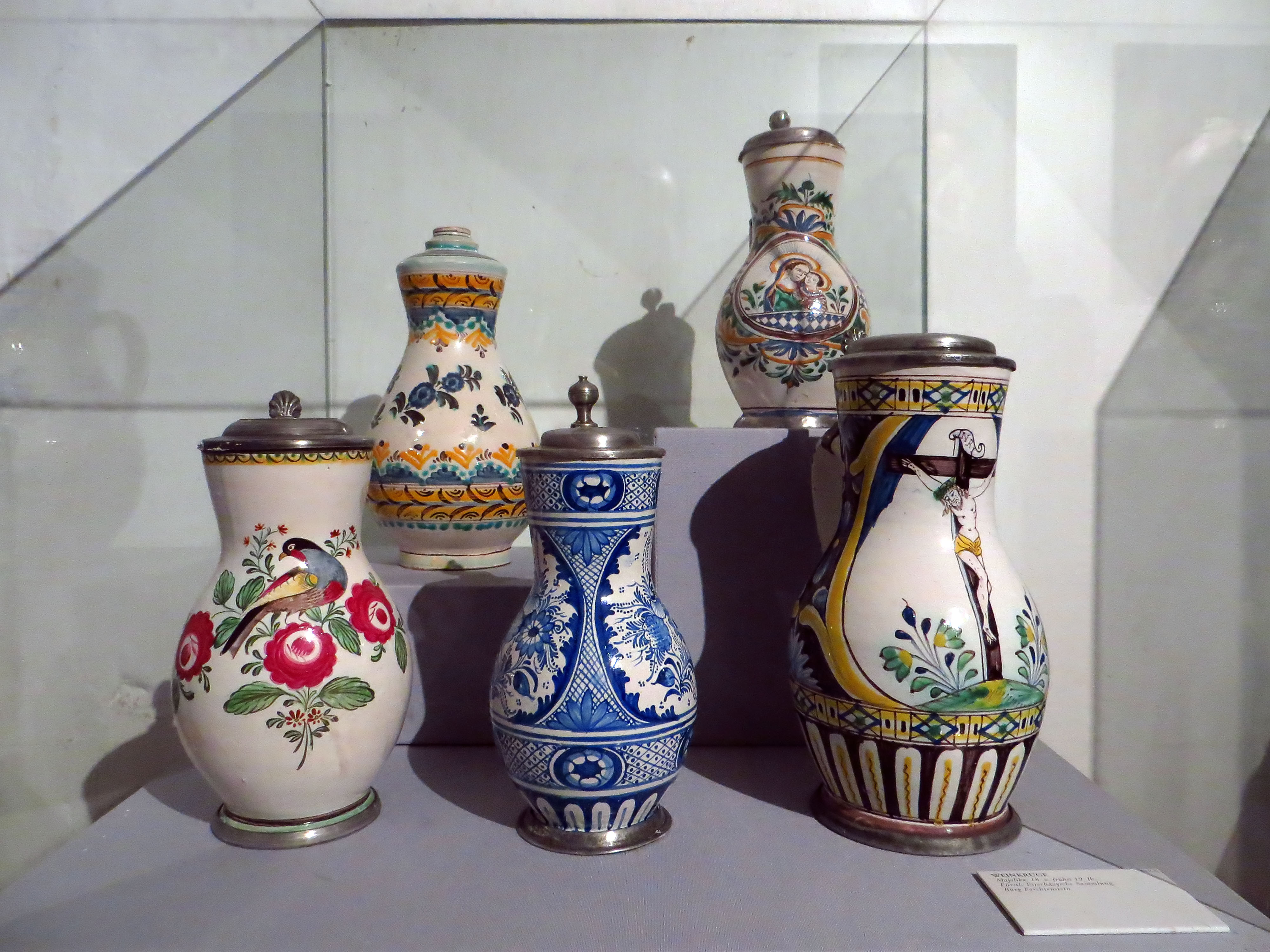 Burg Forchtenstein